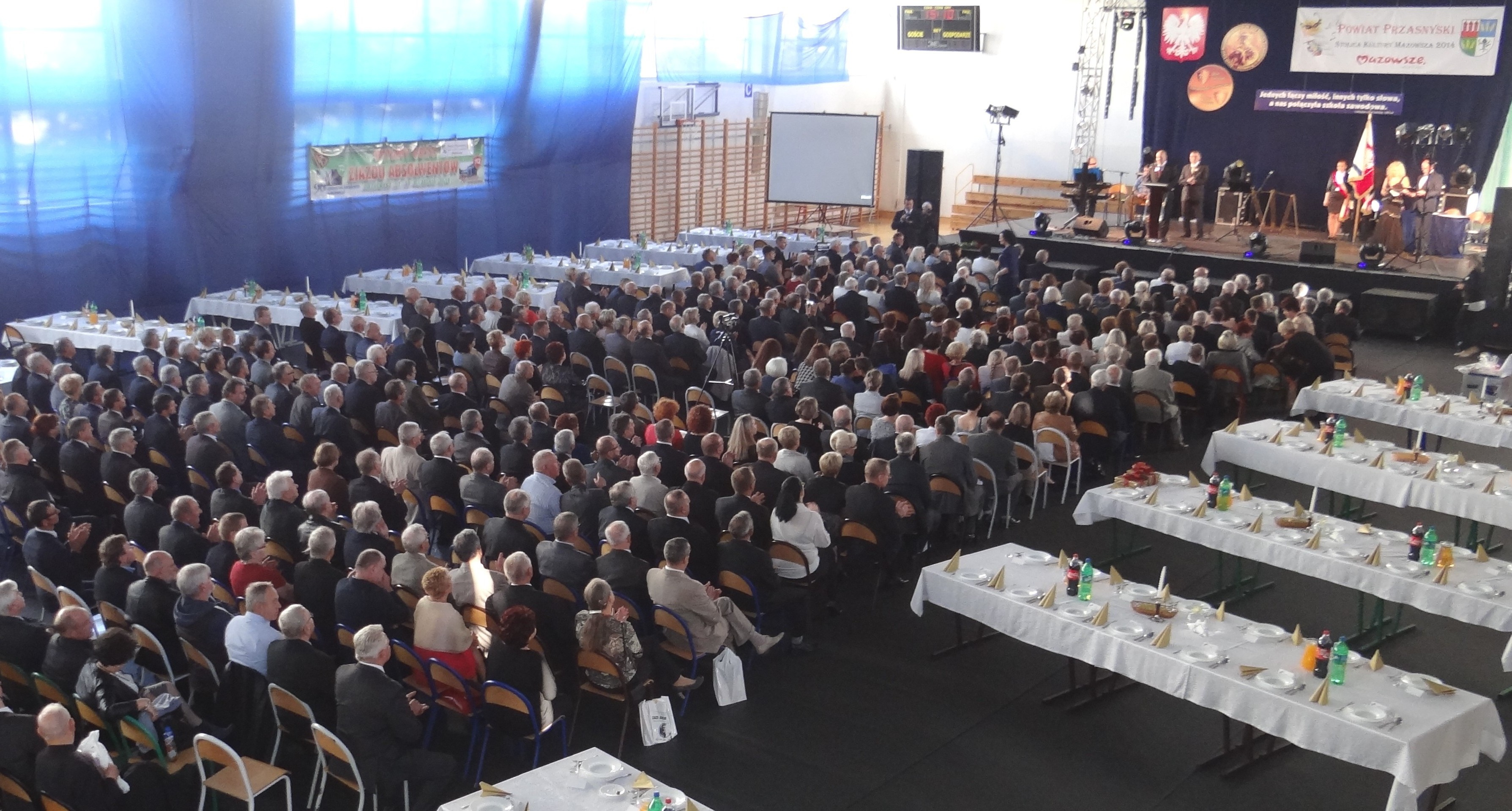 Przasnysz. Uroczystość 90 i 50-lecia